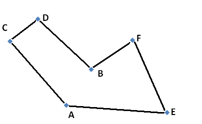 Strecke die die Sukzessive Einbeziehung findet